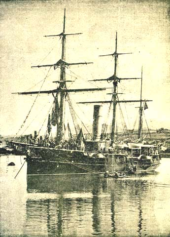 Cañonero "Conde de Venadito".